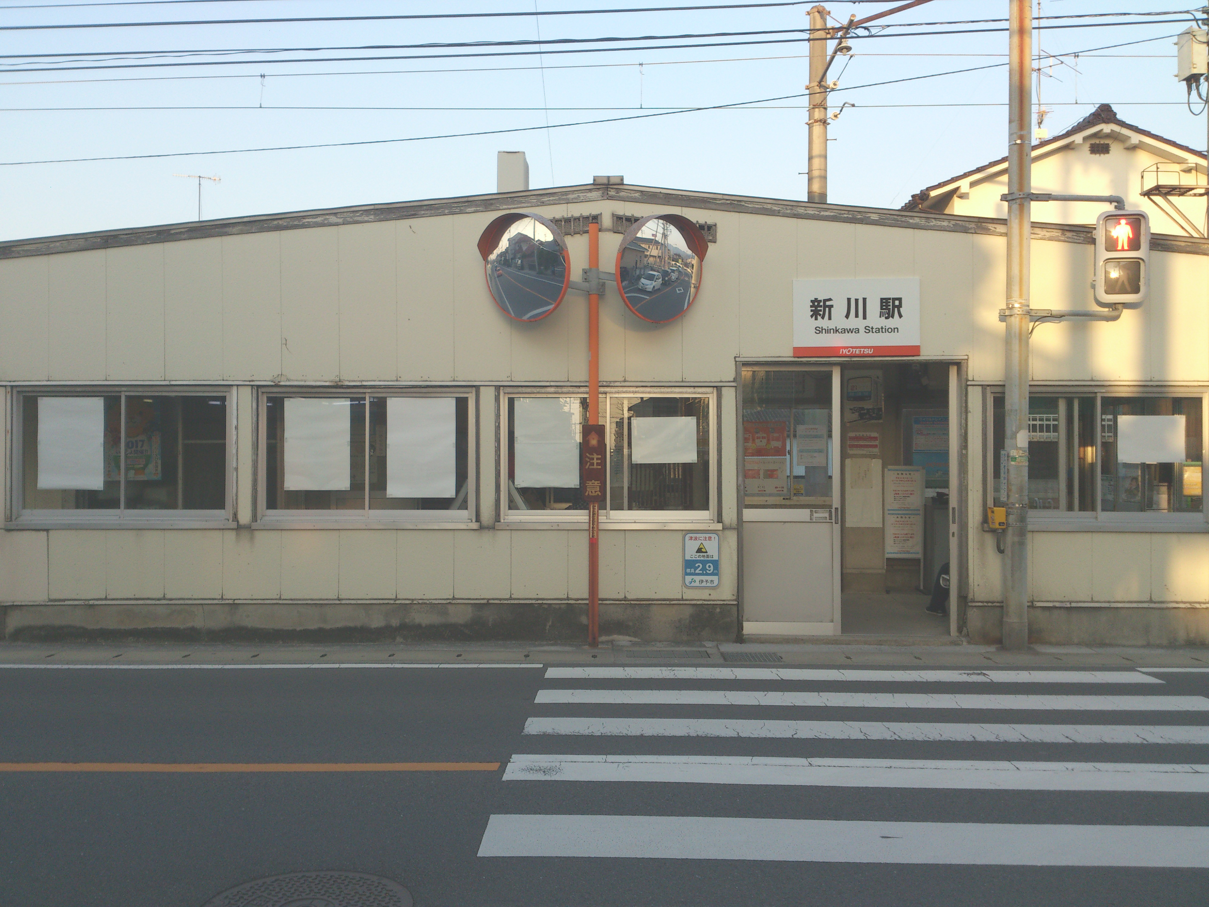 伊予鉄道 新川駅